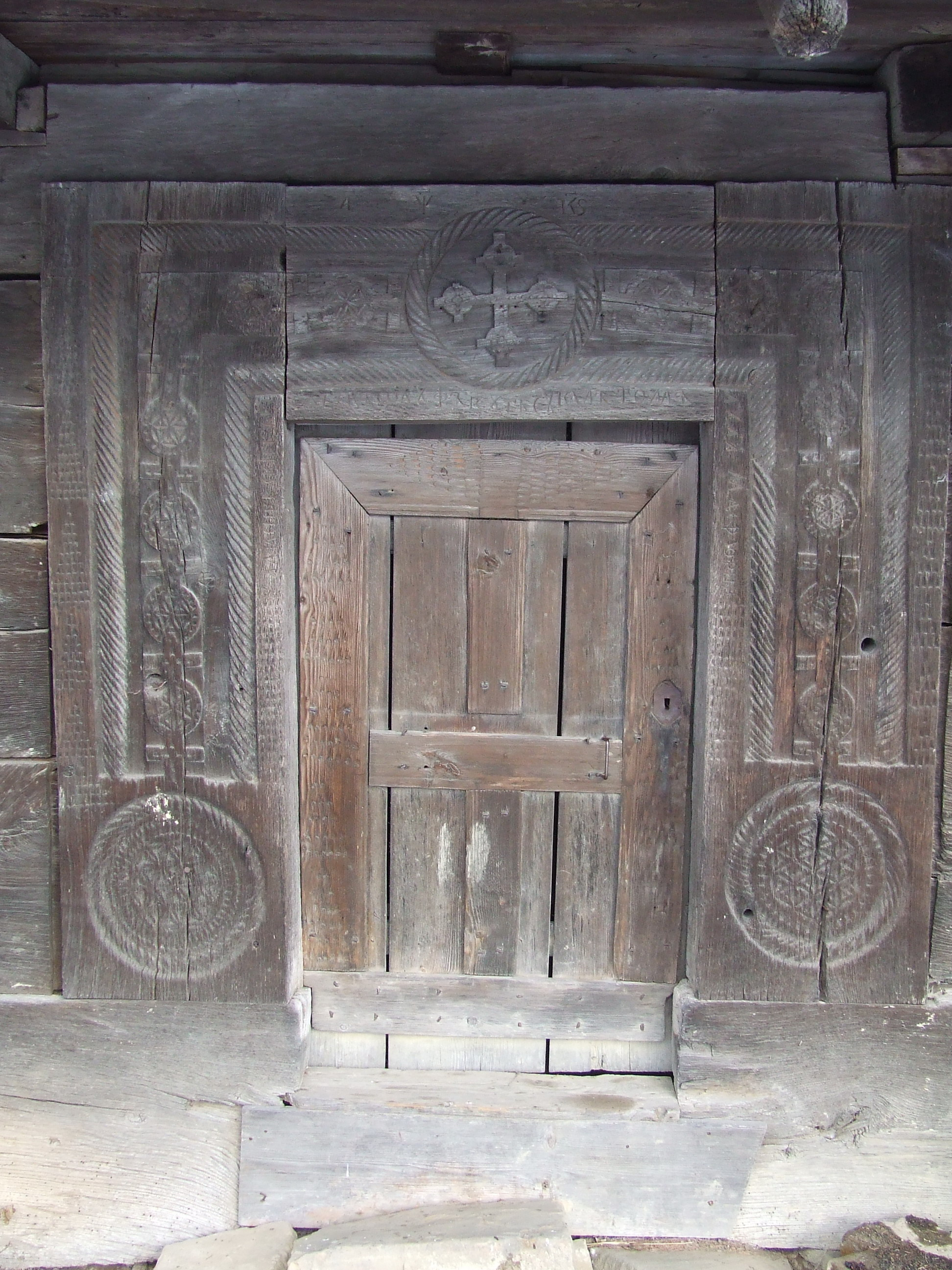 Portalul bisericii de lemn din Vechea, judeţul Cluj.